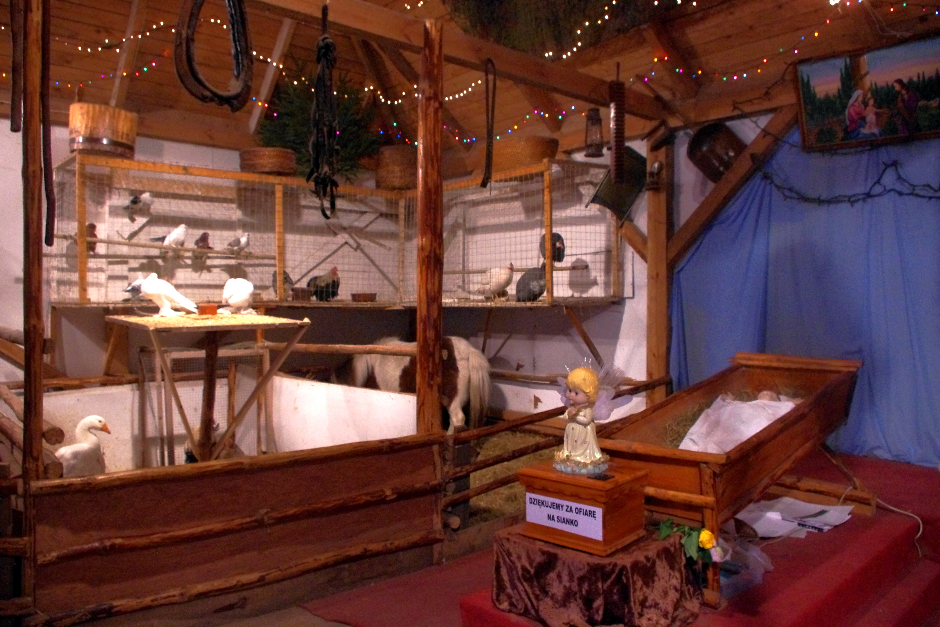 Żywa szopka przy kościele św. Stanisława Kostki w Warszawie – szopka bożonarodzeniowa, zlokalizowana przy modernistycznym kościele parafii rzymskokatolickiej pod wezwaniem św. Stanisława Kostki na warszawskim Żoliborzu, na tyłach Placu Wilsona.